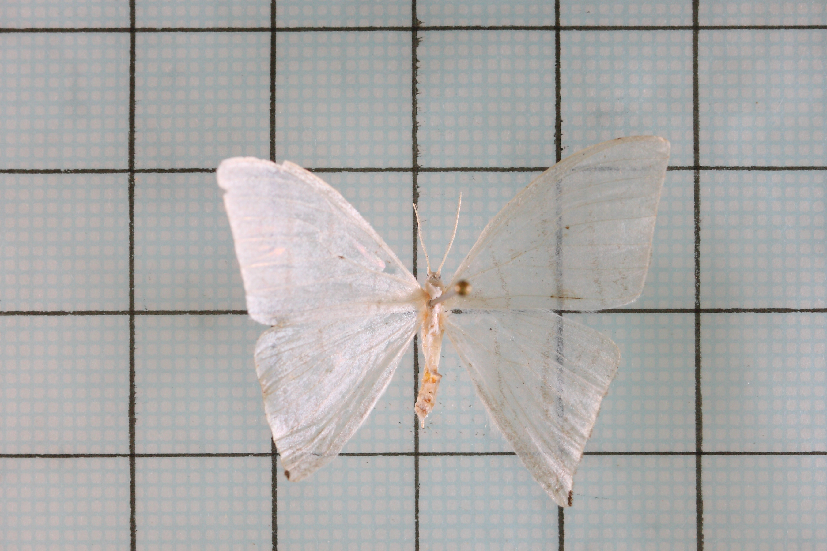 Ditrigona triangularia (Moore 1868) 燕鉤蛾 鞍2:P.32,Pl.38-7